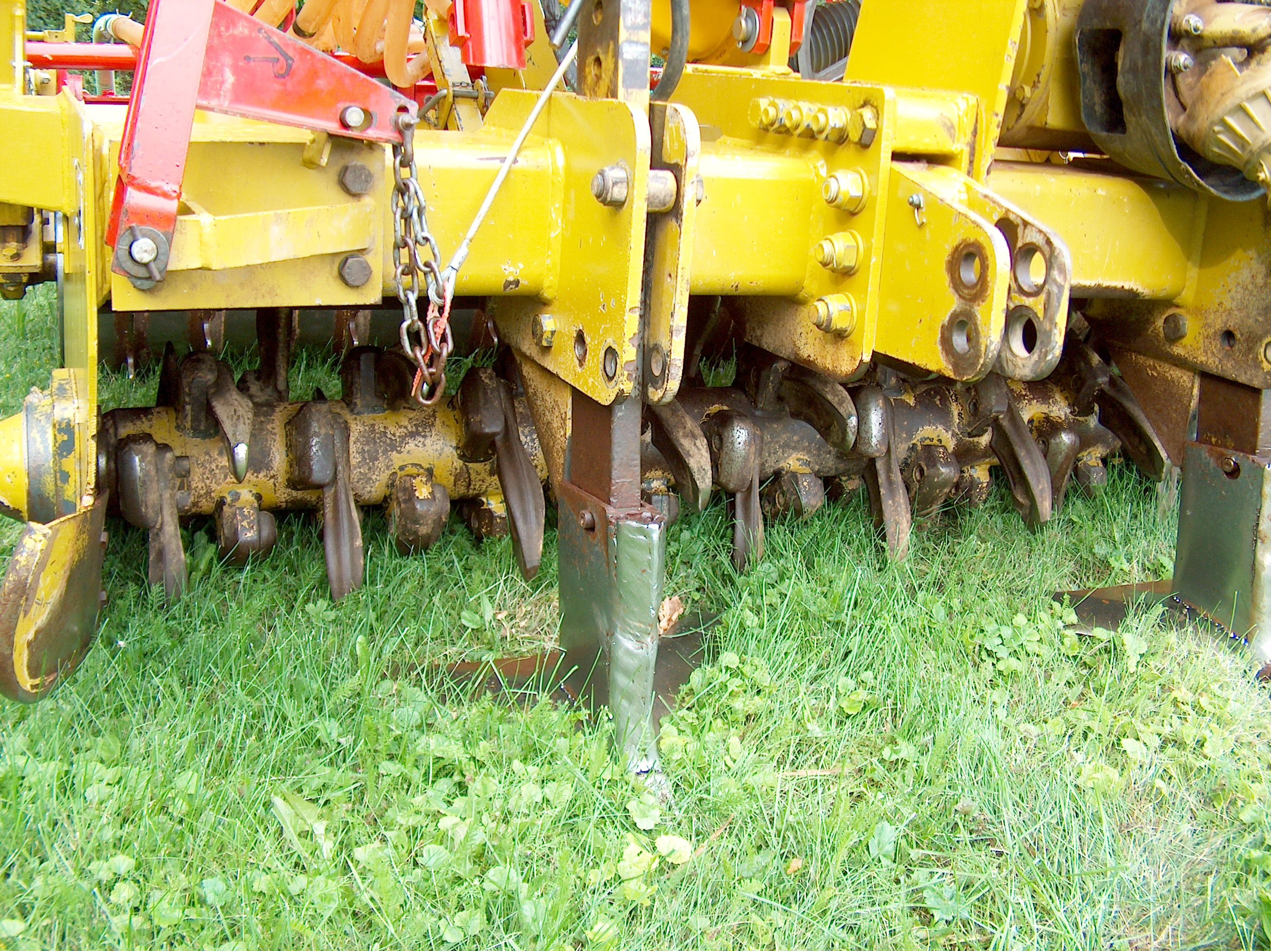 Zinkenrotoregge